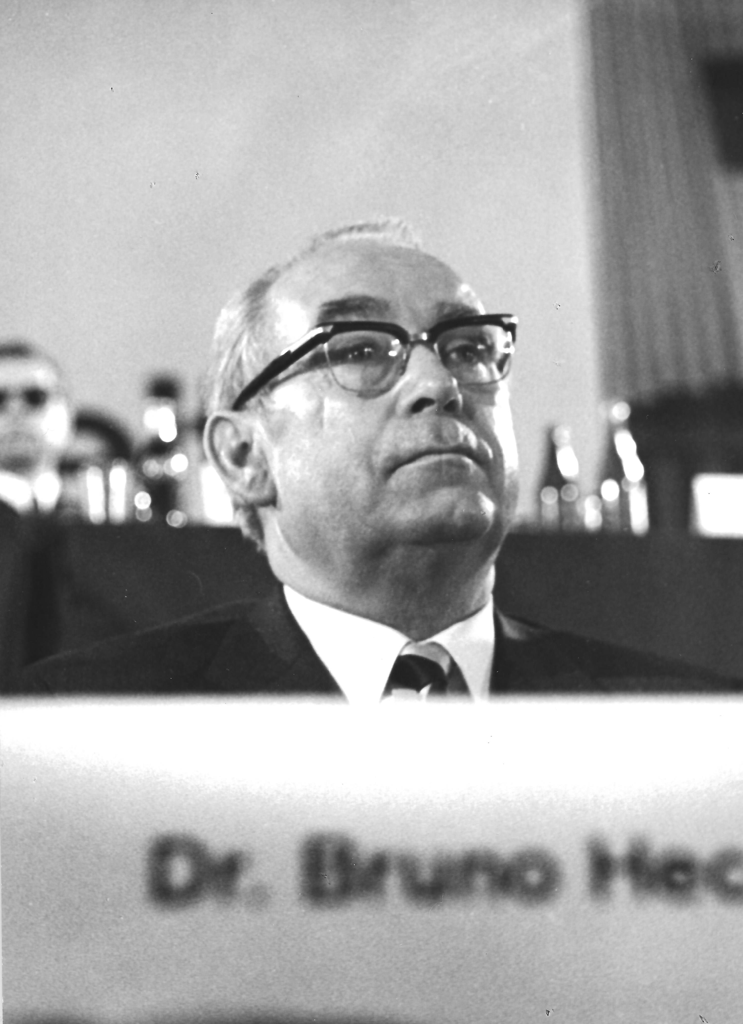 Bruno Heck; CDU-Bundesparteitag 1971 in Düsseldorf